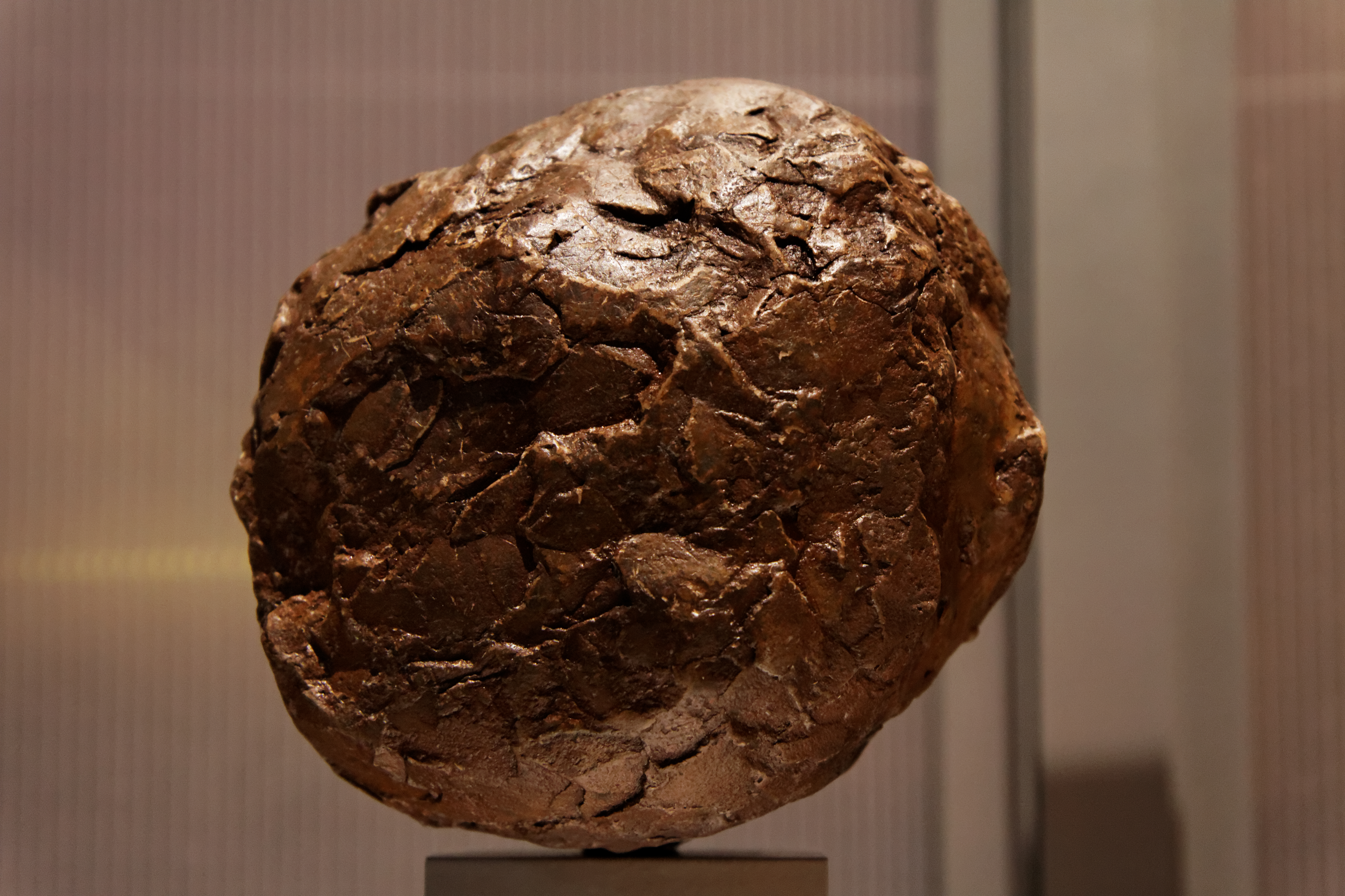 Un oeuf d'amplosaurus atacis exposé lors de l'exposition "la vie en grand" dans la grande galerie de l'évoution à Paris. Le poids moyen estimé de cet oeuf est de 4 kilos à comparer aux sept tonnes de l'animal adulte.